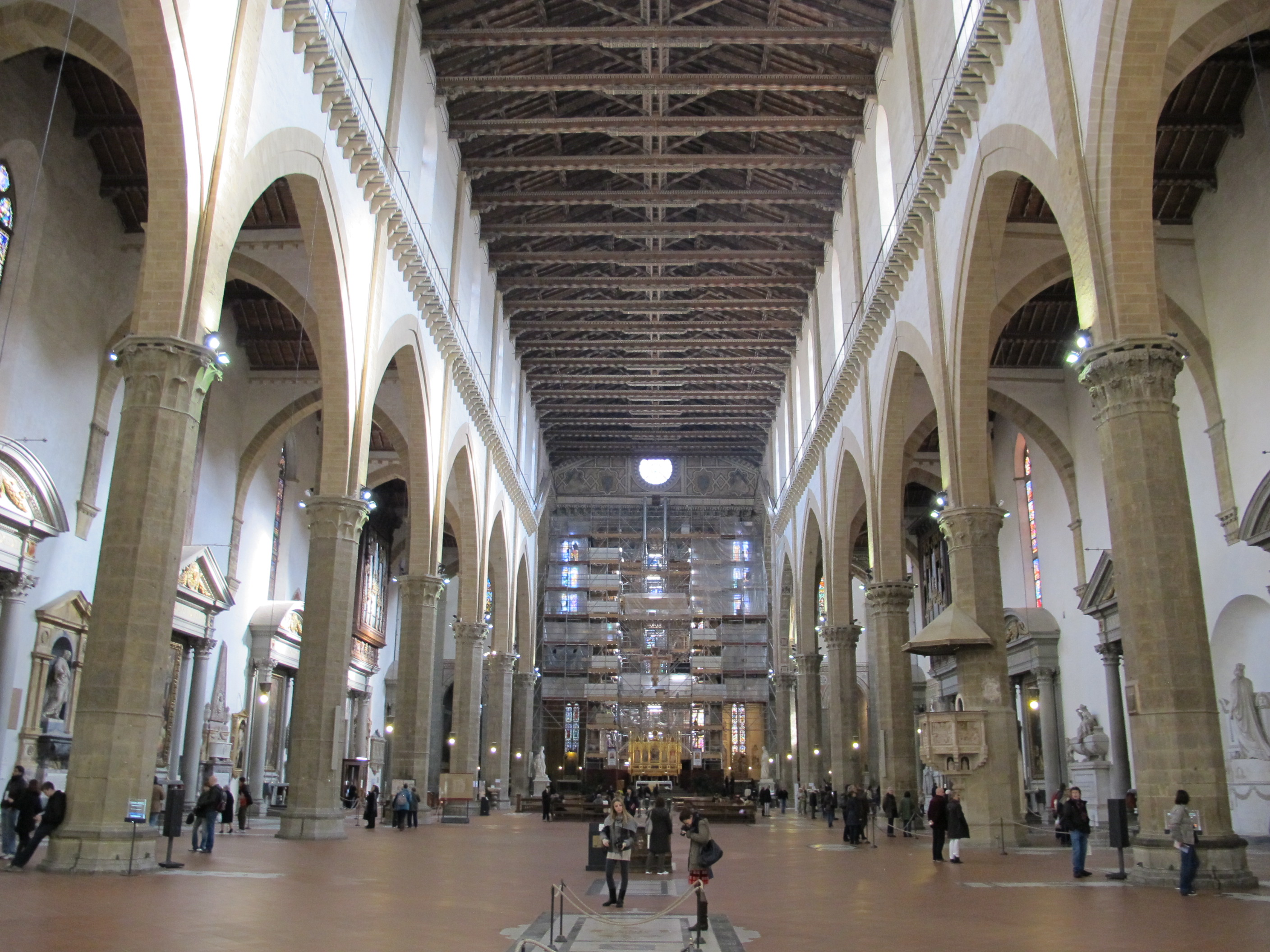 S. croce, navata centrale